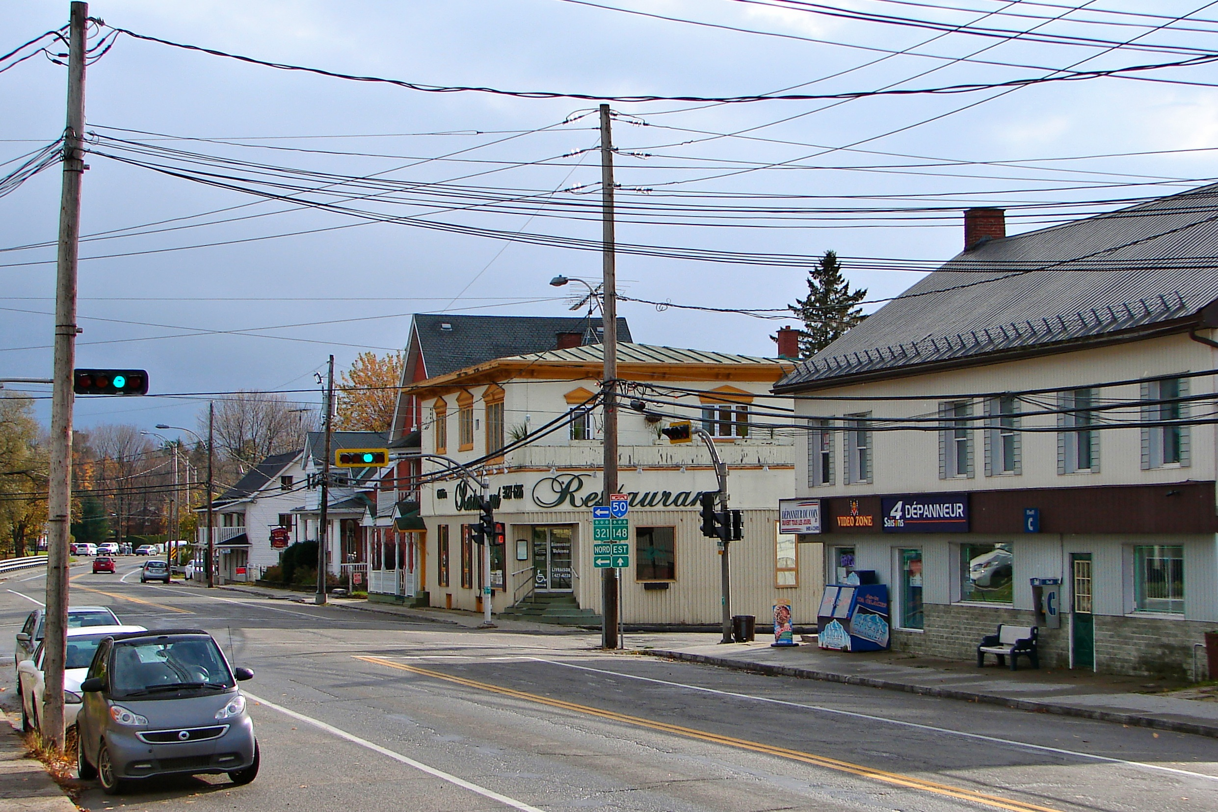 Papineauville, Quebec, Canada